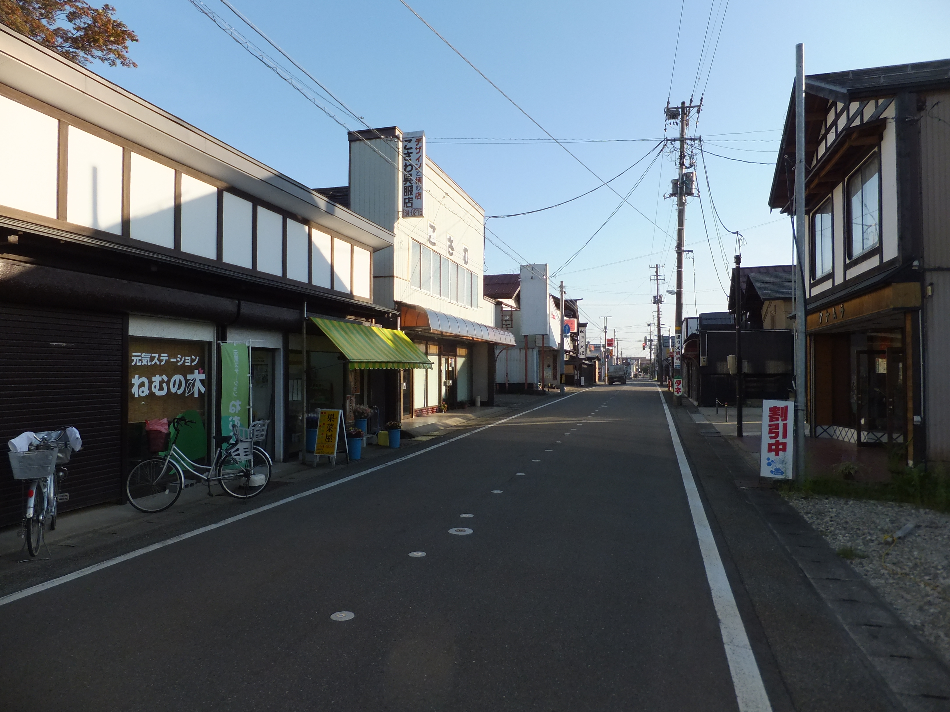 市場通り商店街（秋田県美郷町六郷）